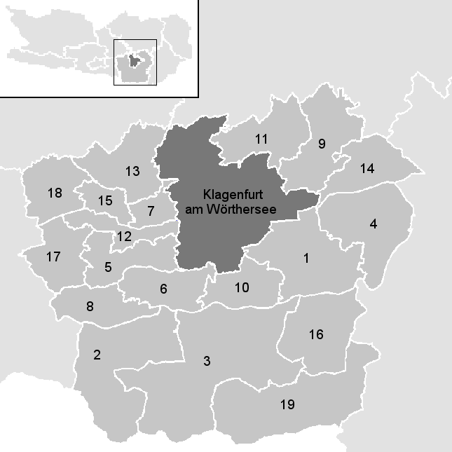 Leere Karte mit den Gemeinden im Österreichischen Bezirk Klagenfurt-Land